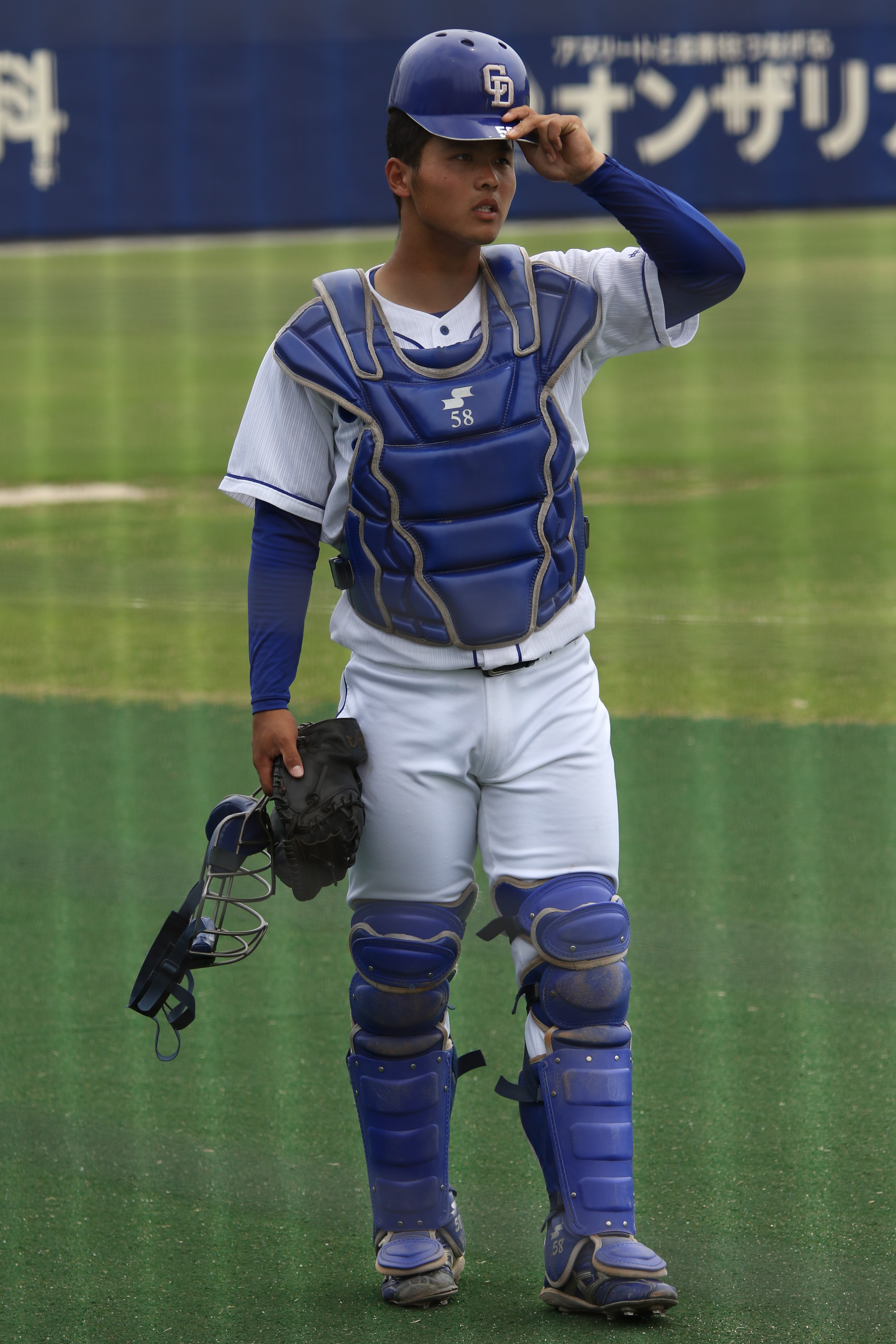 2019年6月23日、ナゴヤ球場にて